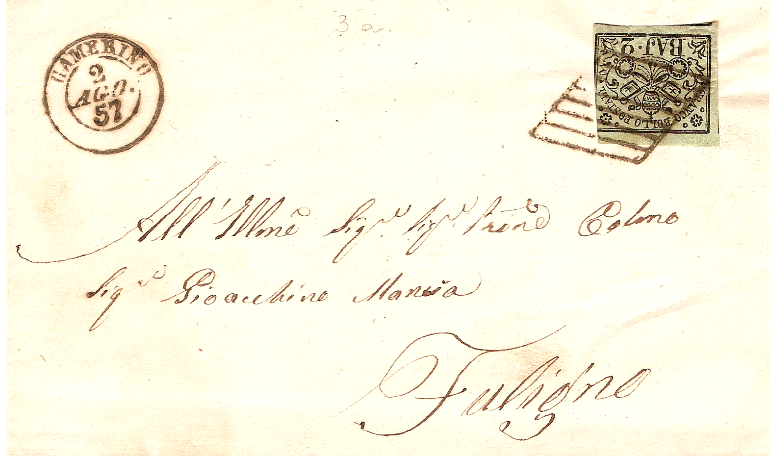 Lettre d'Italie (états de l'Eglise de 1857)